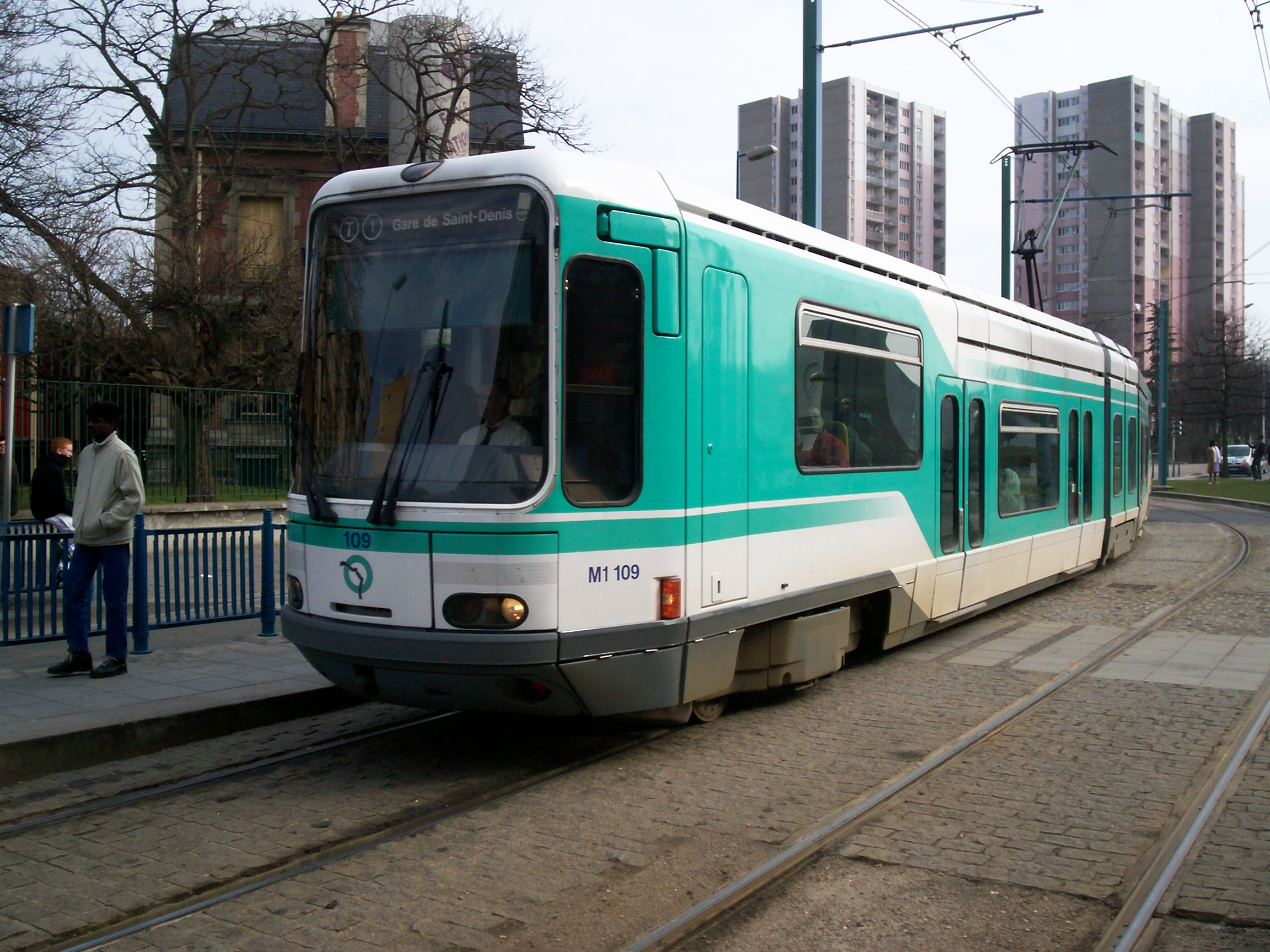 T1 à Libération